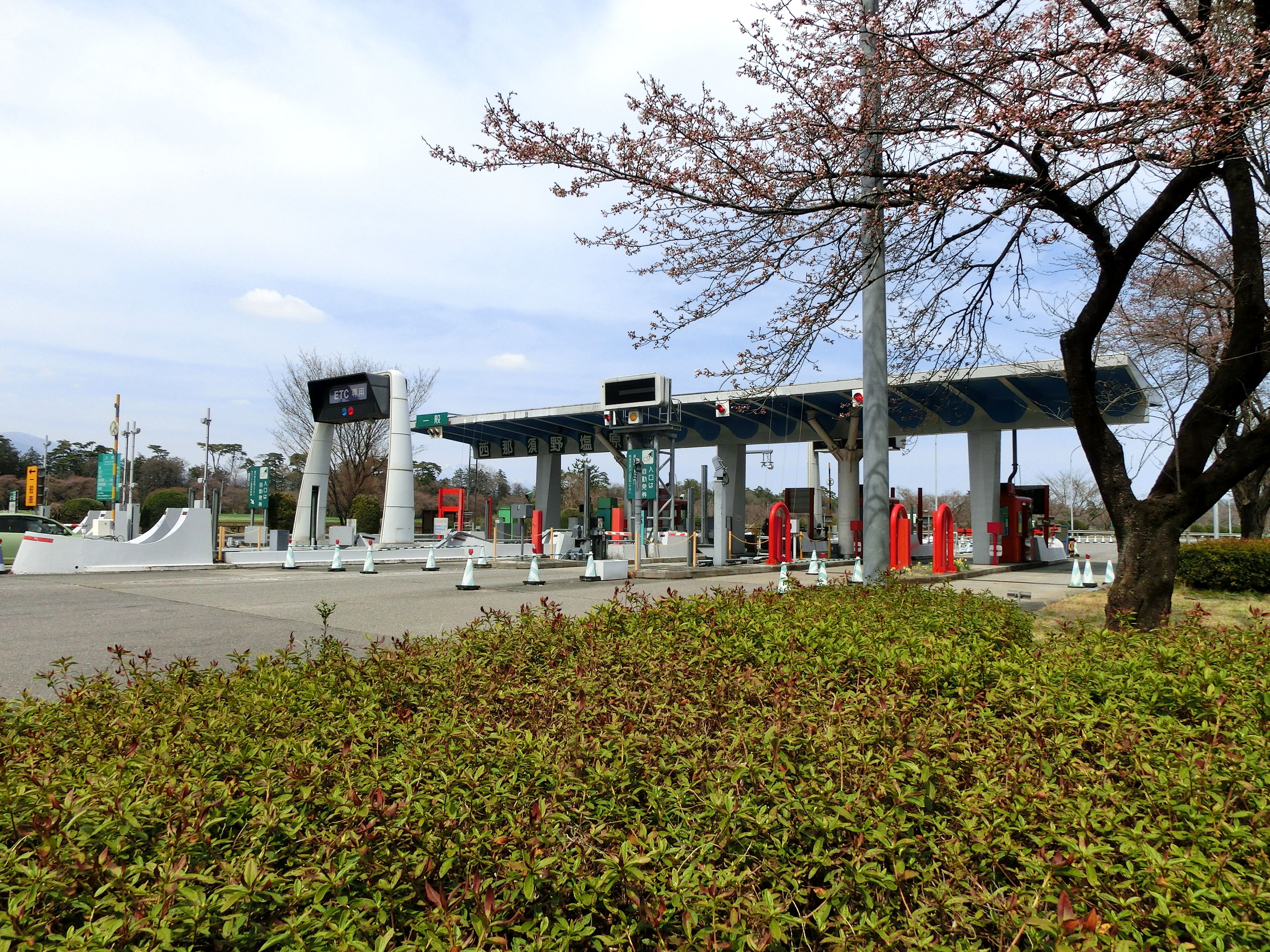 東北自動車道 西那須野塩原インターチェンジ（料金所付近）